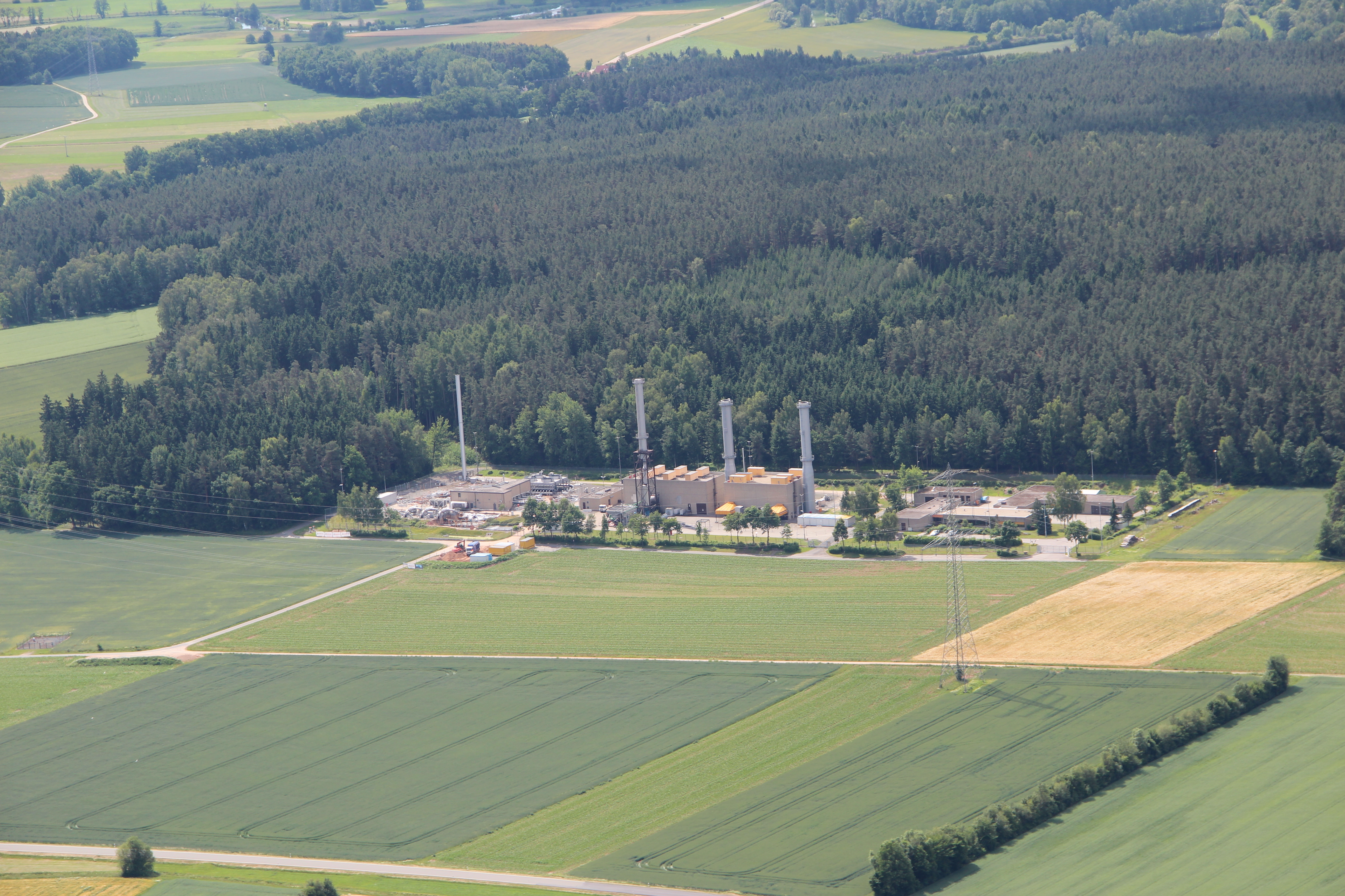 Megal-Verdichterstation Rothenstadt, Landkreis Neustadt an der Waldnaab, Oberpfalz, Bayern (2012); Bereiche am oberen Bildrand teilweise in Luhe-Wildenau und Etzenricht.